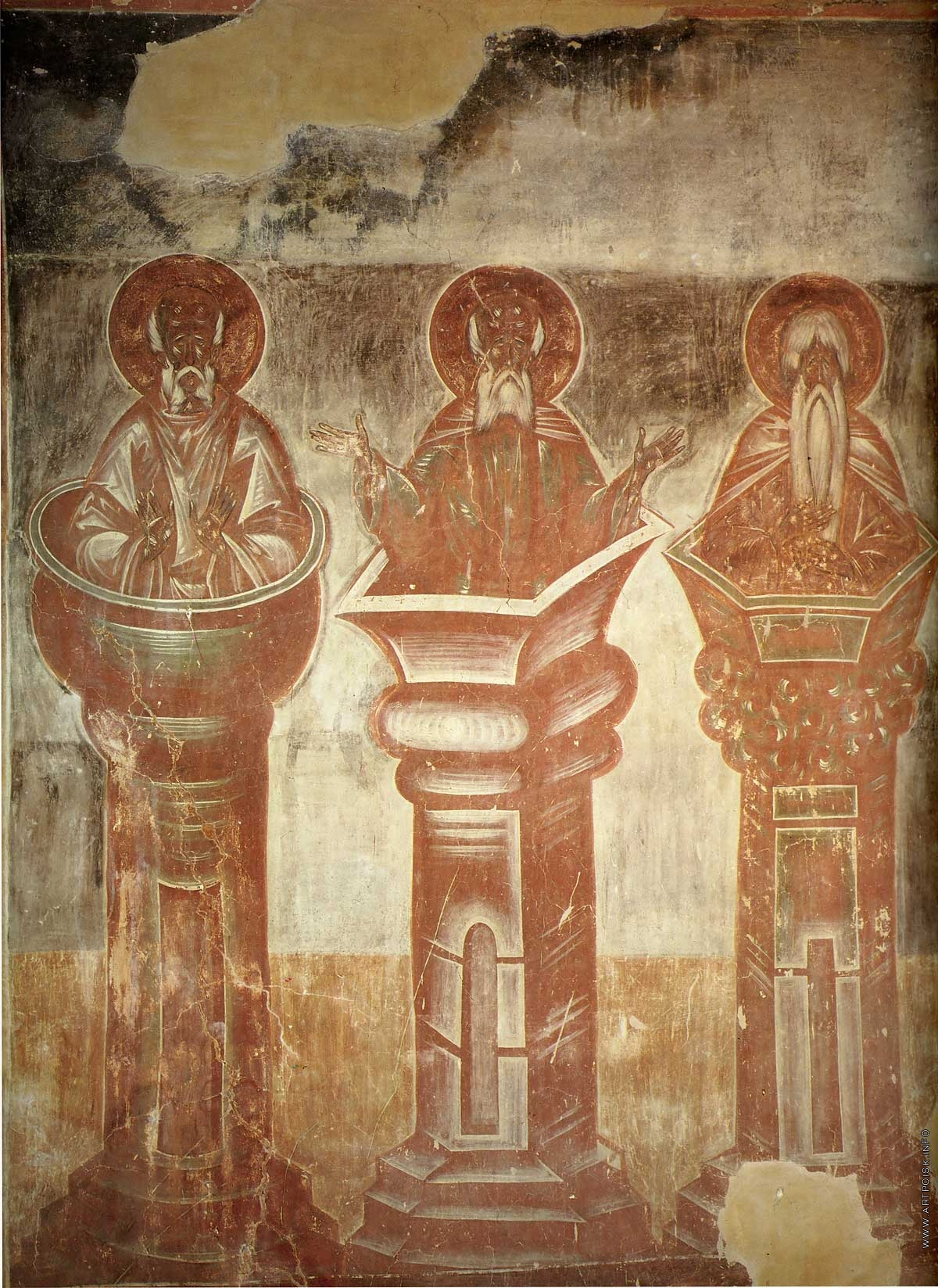 Фрески церкви Спаса на Ильине